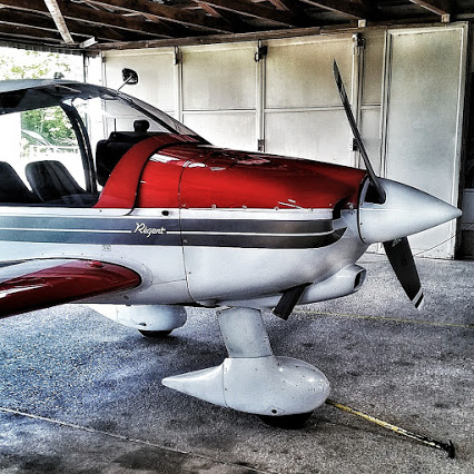 aereo aviosuperficie Farrenberg